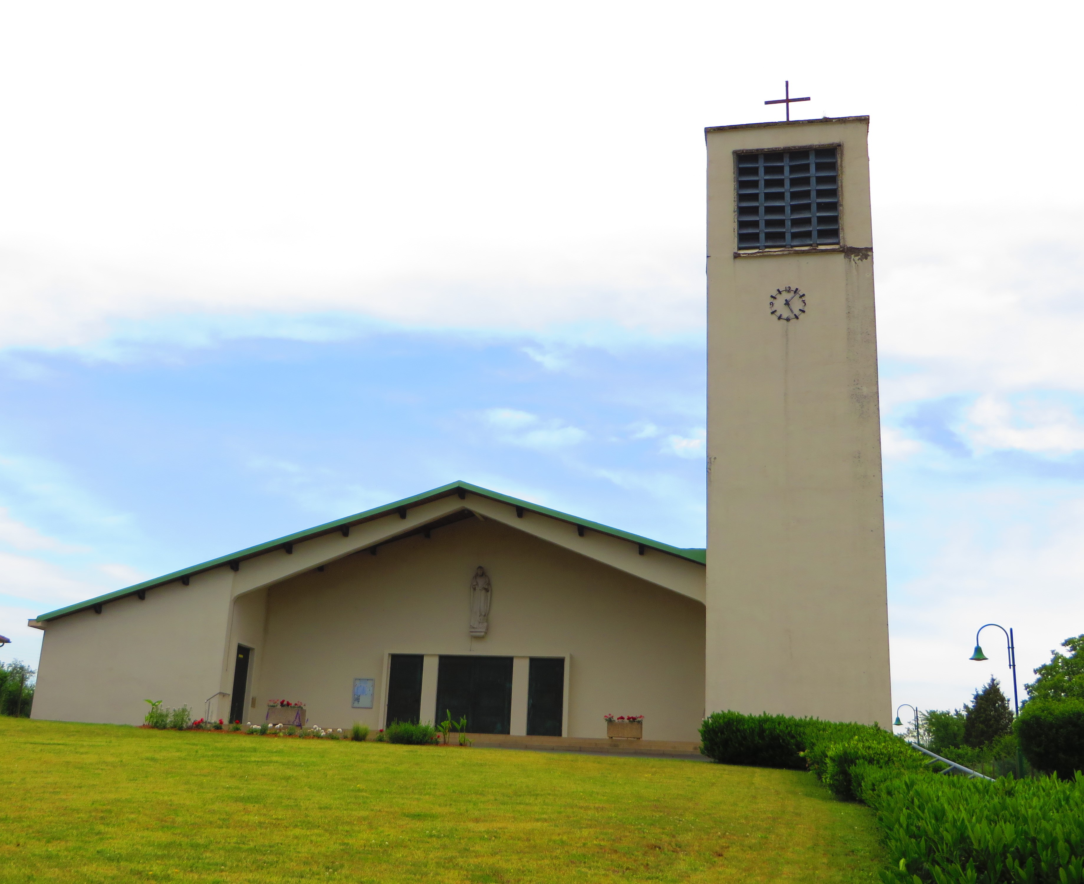 Loupershouse Église Saint-Matthieu